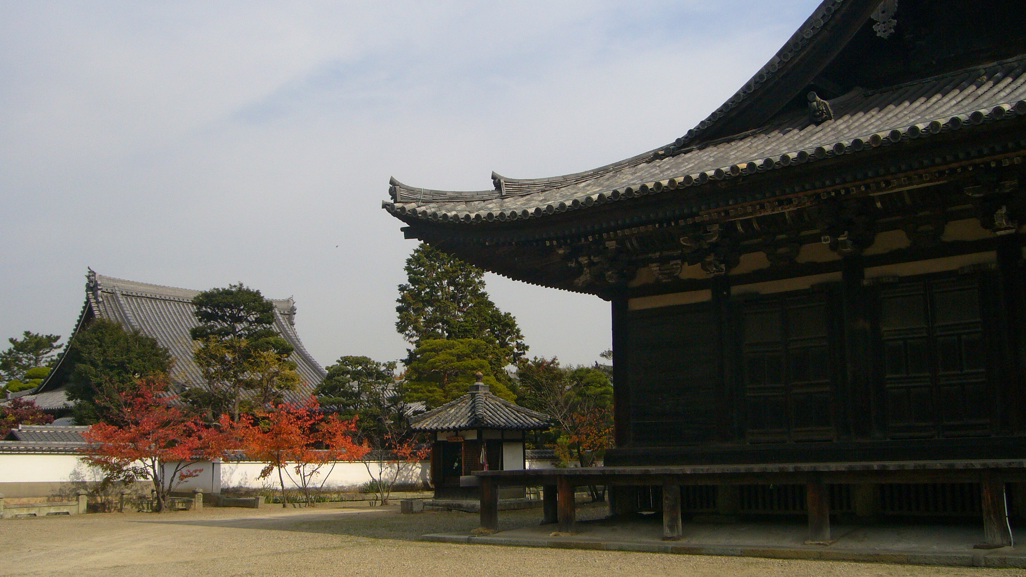 Kakurinji, Kakogawa, Hyogo, Japan